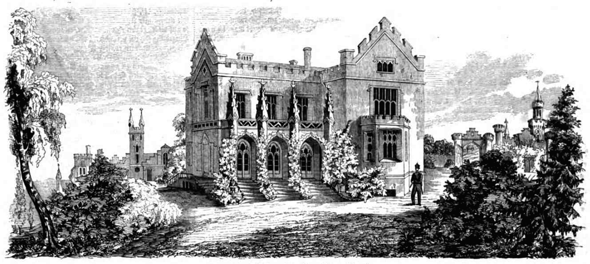 Villa bei Richmond unfern Braunschweig.